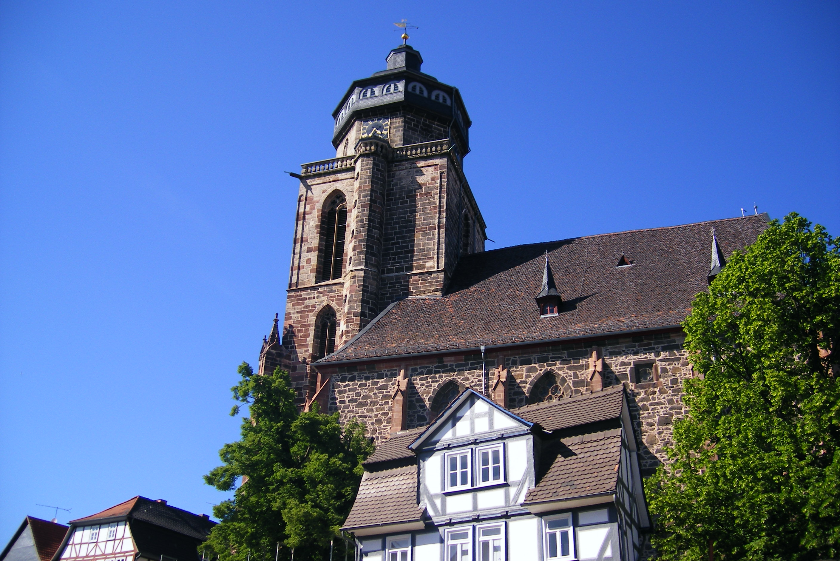 Blick auf die Stadtkirche St. Marien vom Marktplatz aus